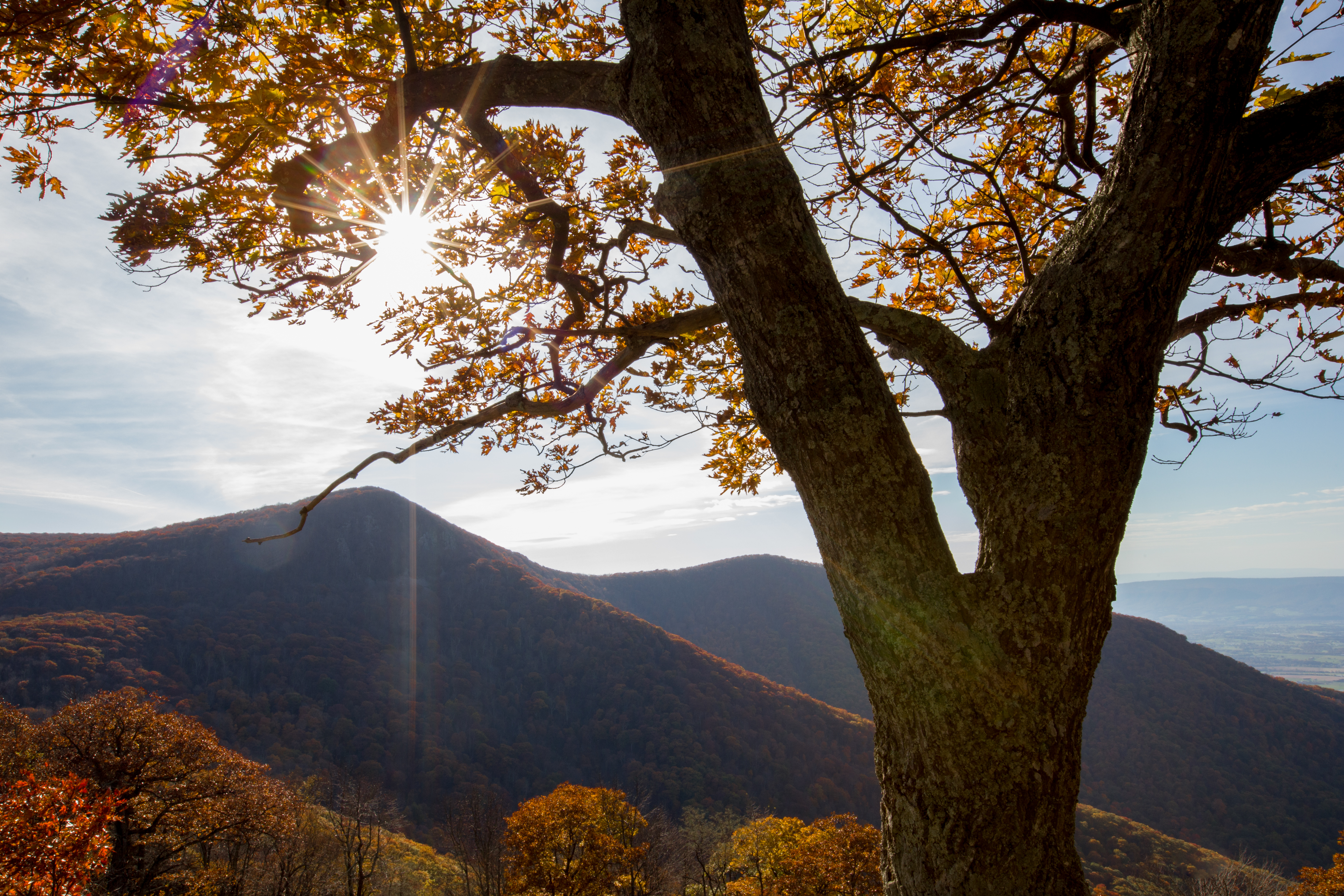 NPS | Katy Cain